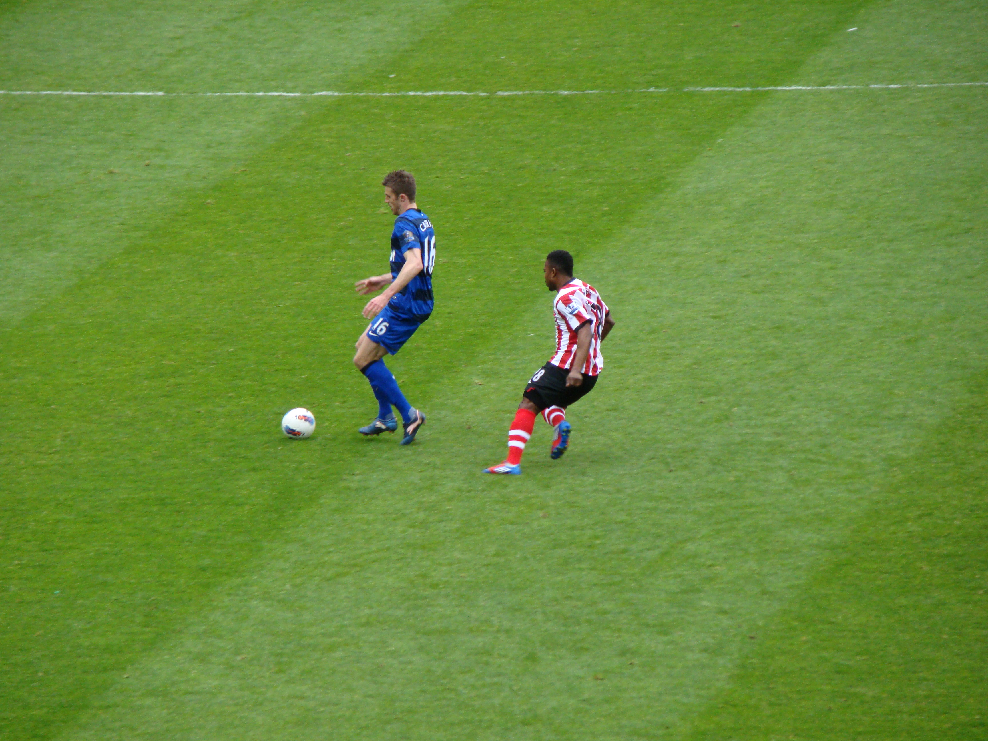 SAFC vs MUFC